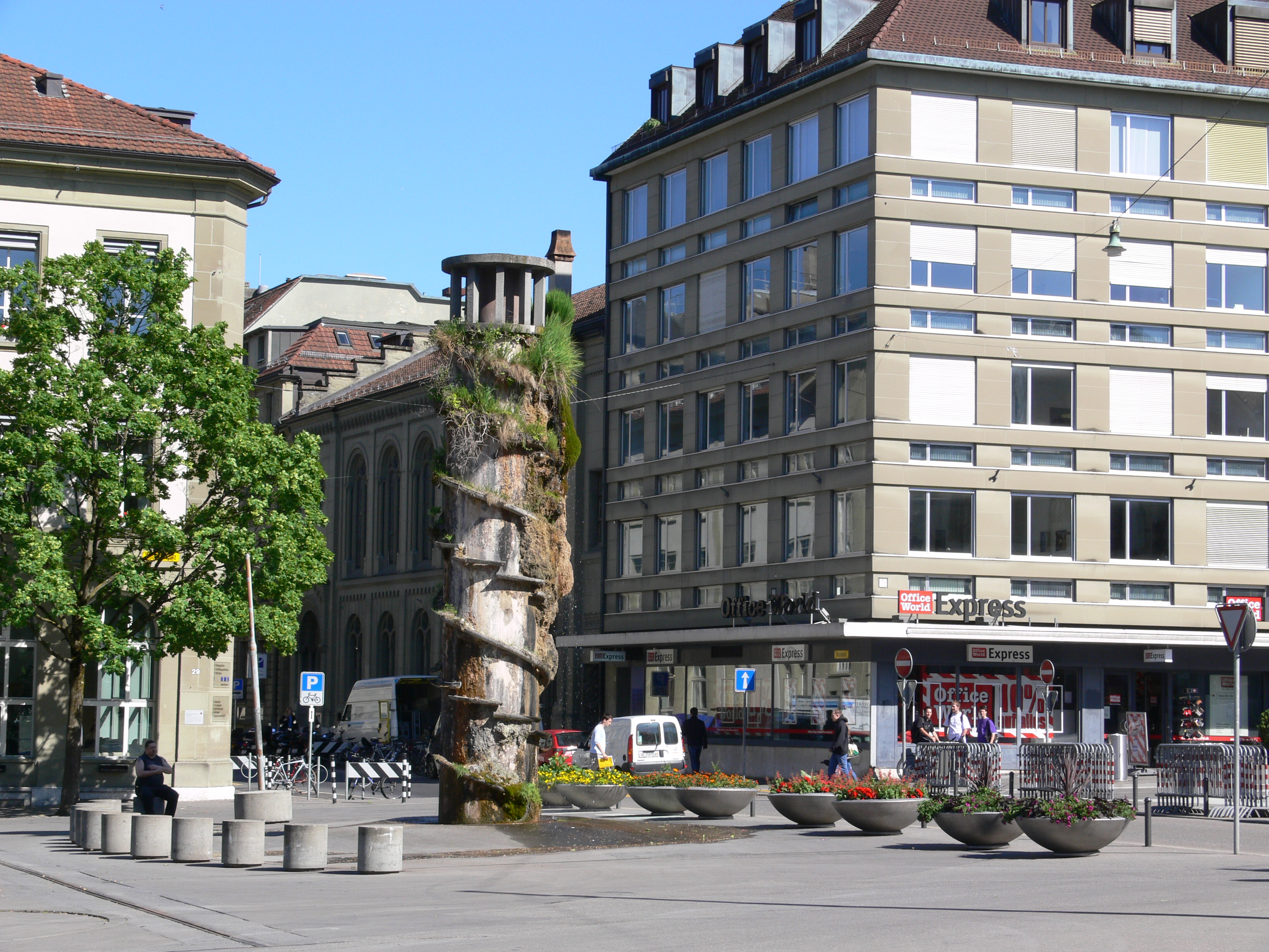 Bern, Oppenheimbrunnen am Waisenhausplatz